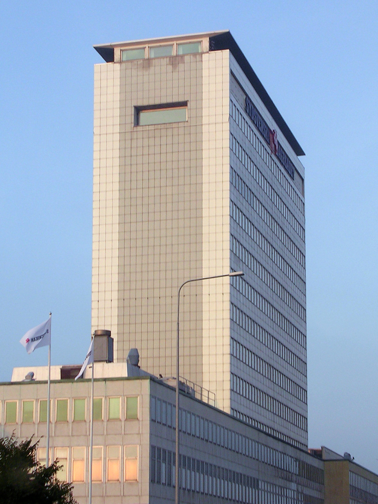 Sydsvenskan building